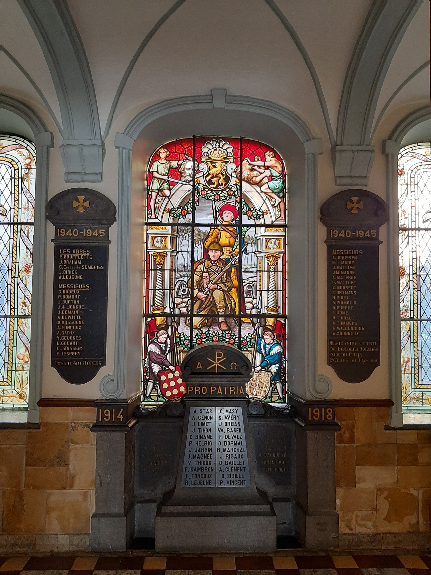 Monument aux morts Saint-Quirin (guerre 14-18 et 40-45)